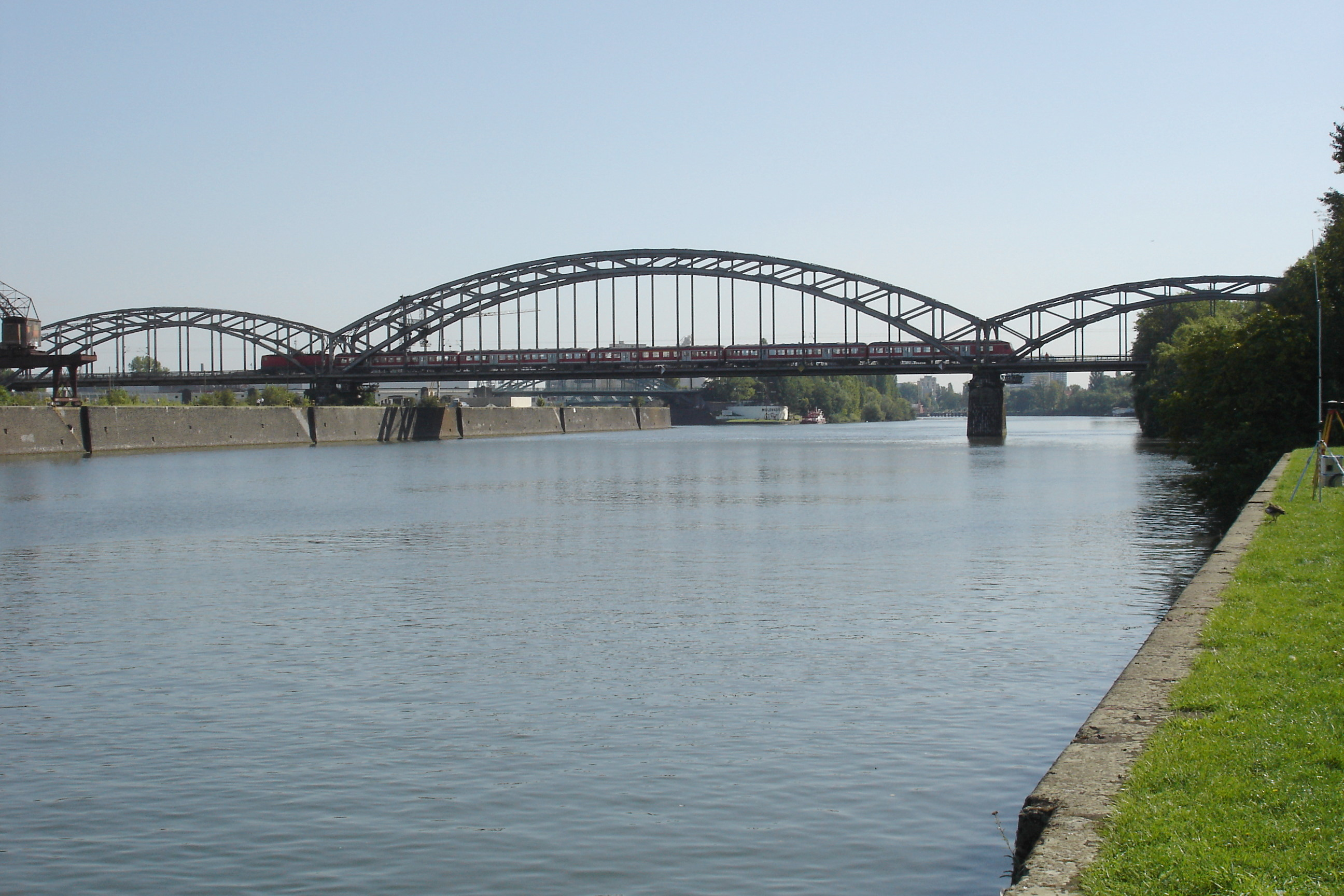 Deutschherrnbrücke von Westen während Bahnüberquerung